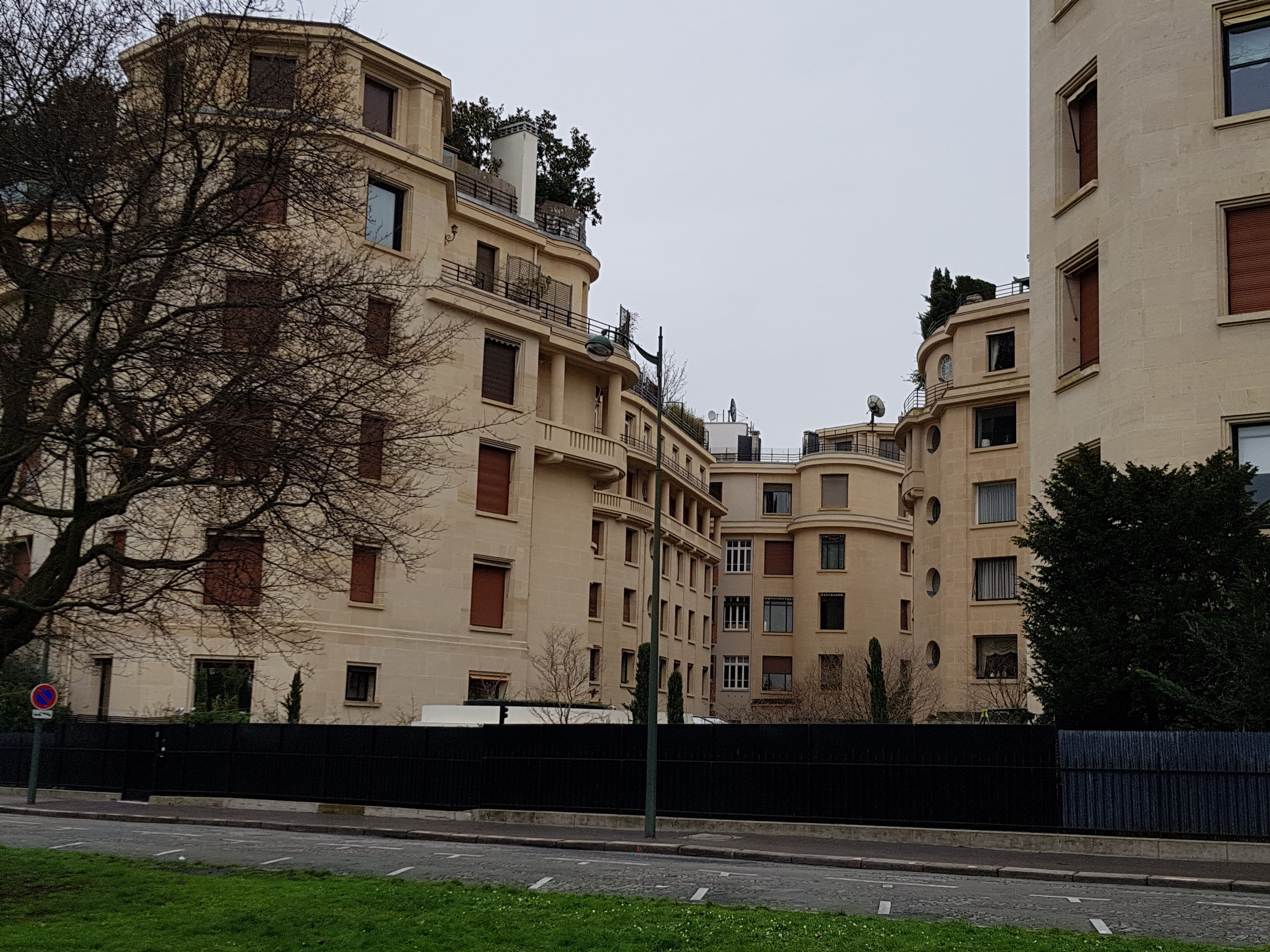 Les immeubles Walter, Paris, en février 2018.